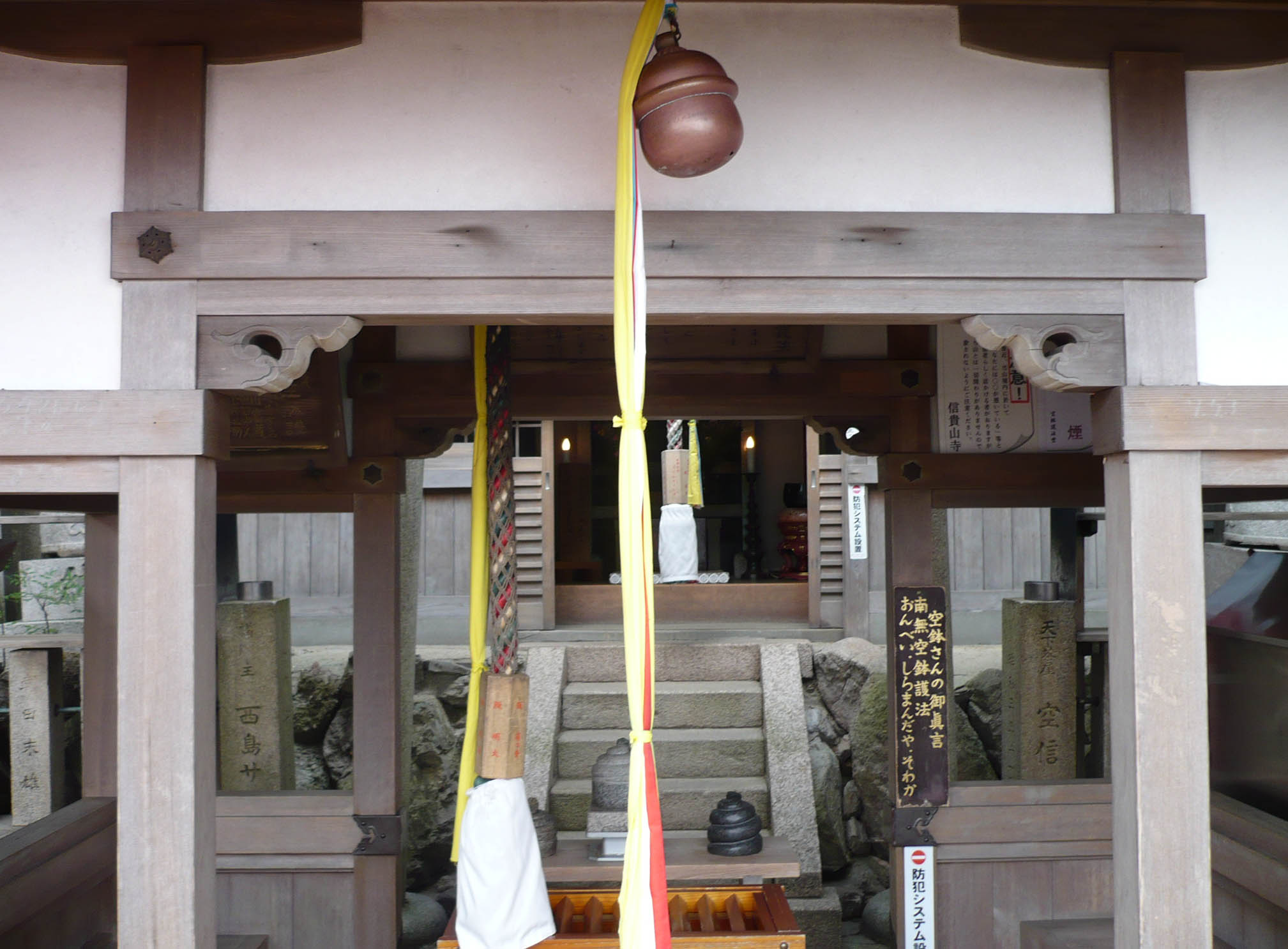 空鉢堂